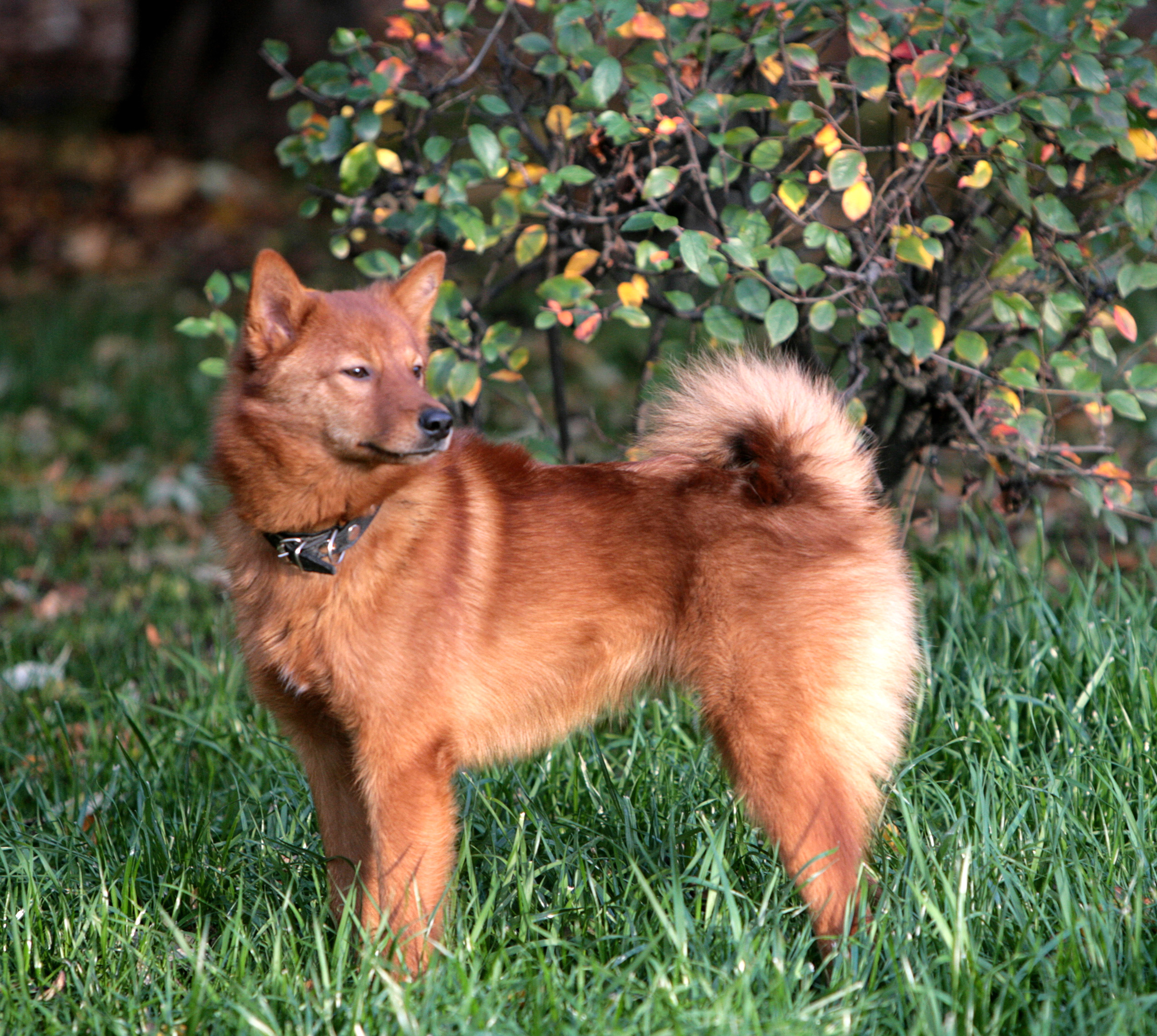 Карело-финская лайка Финский шпиц